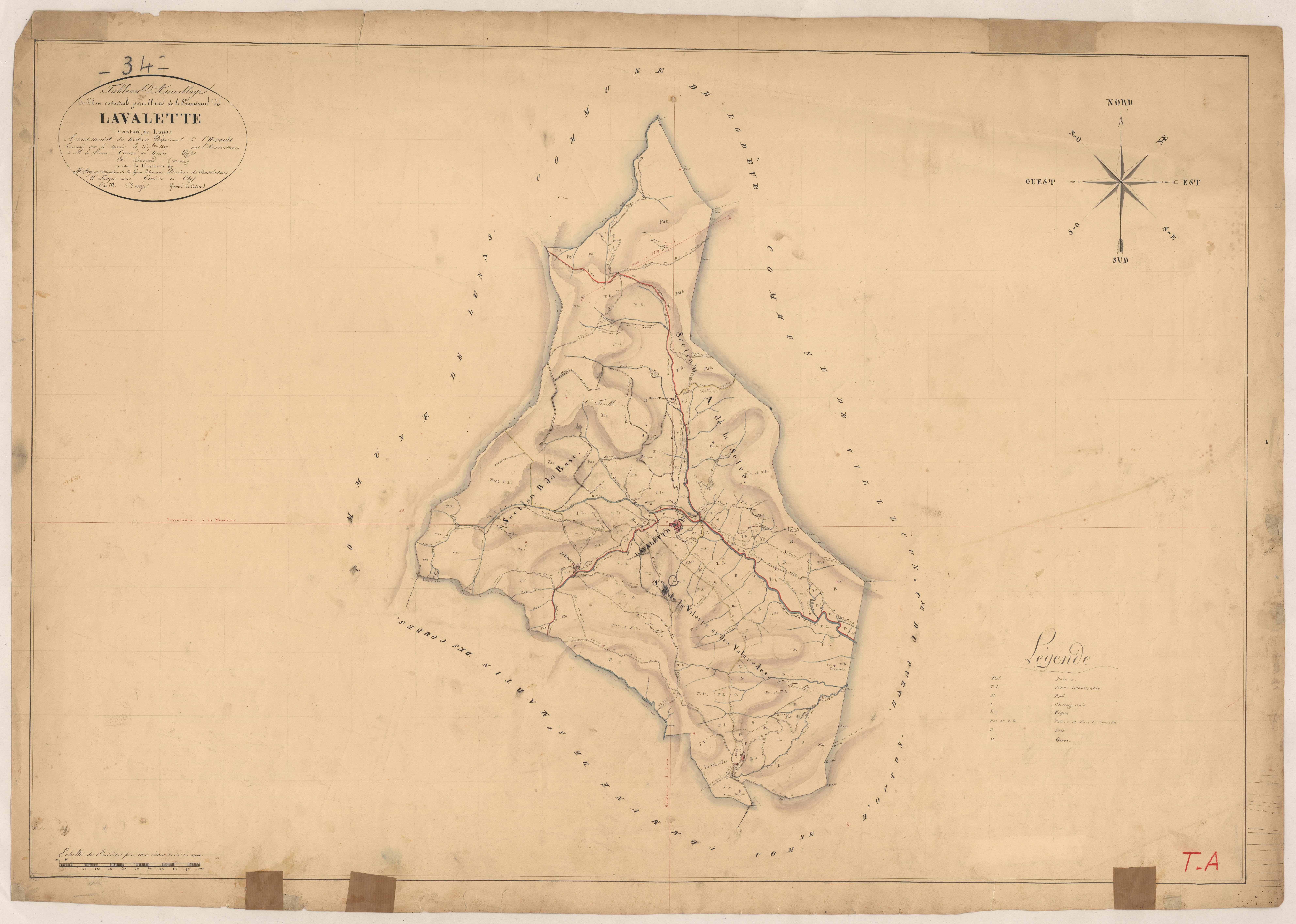 Lavalette. - Cadastre napoléonien : tableau d'assemblage